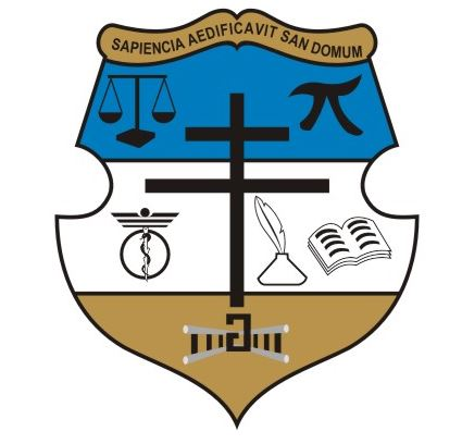 Anterior Escudo UCDC